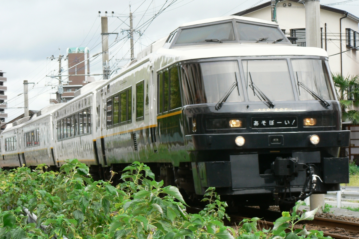 JR九州キハ183-1000 (あそぼーい！) 出来が悪いですが暫定版として。